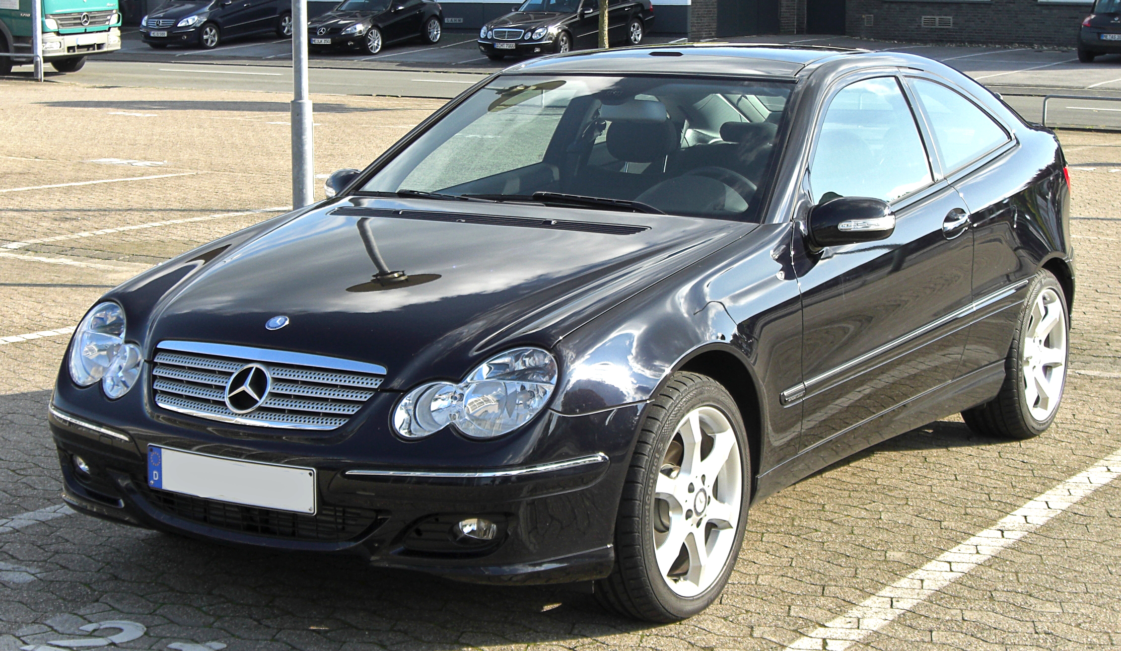 Mercedes CL350